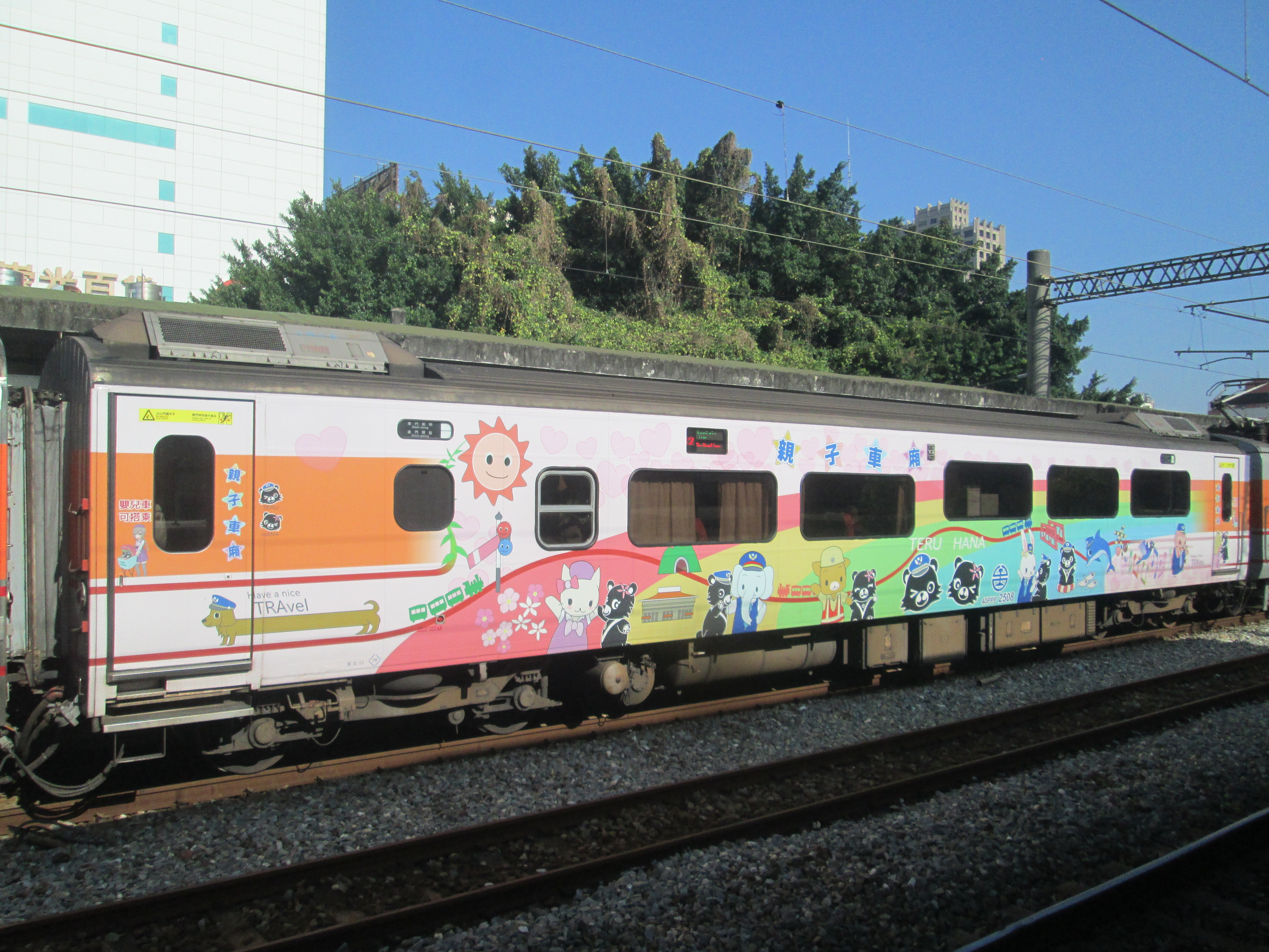 臺灣鐵路管理局推拉式自強號親子車廂PPP2508。